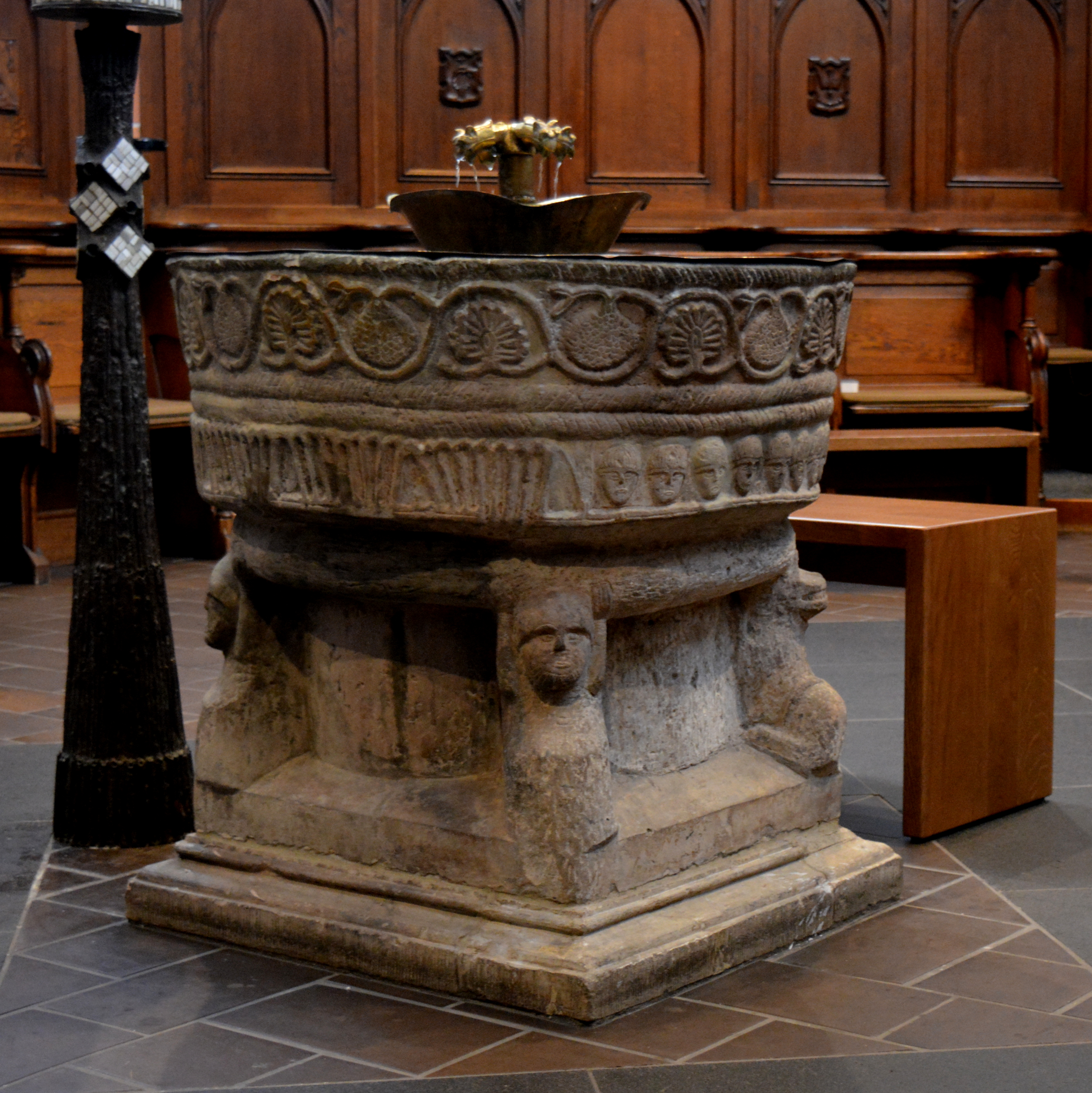 St. Remigius (Borken), Taufbecken